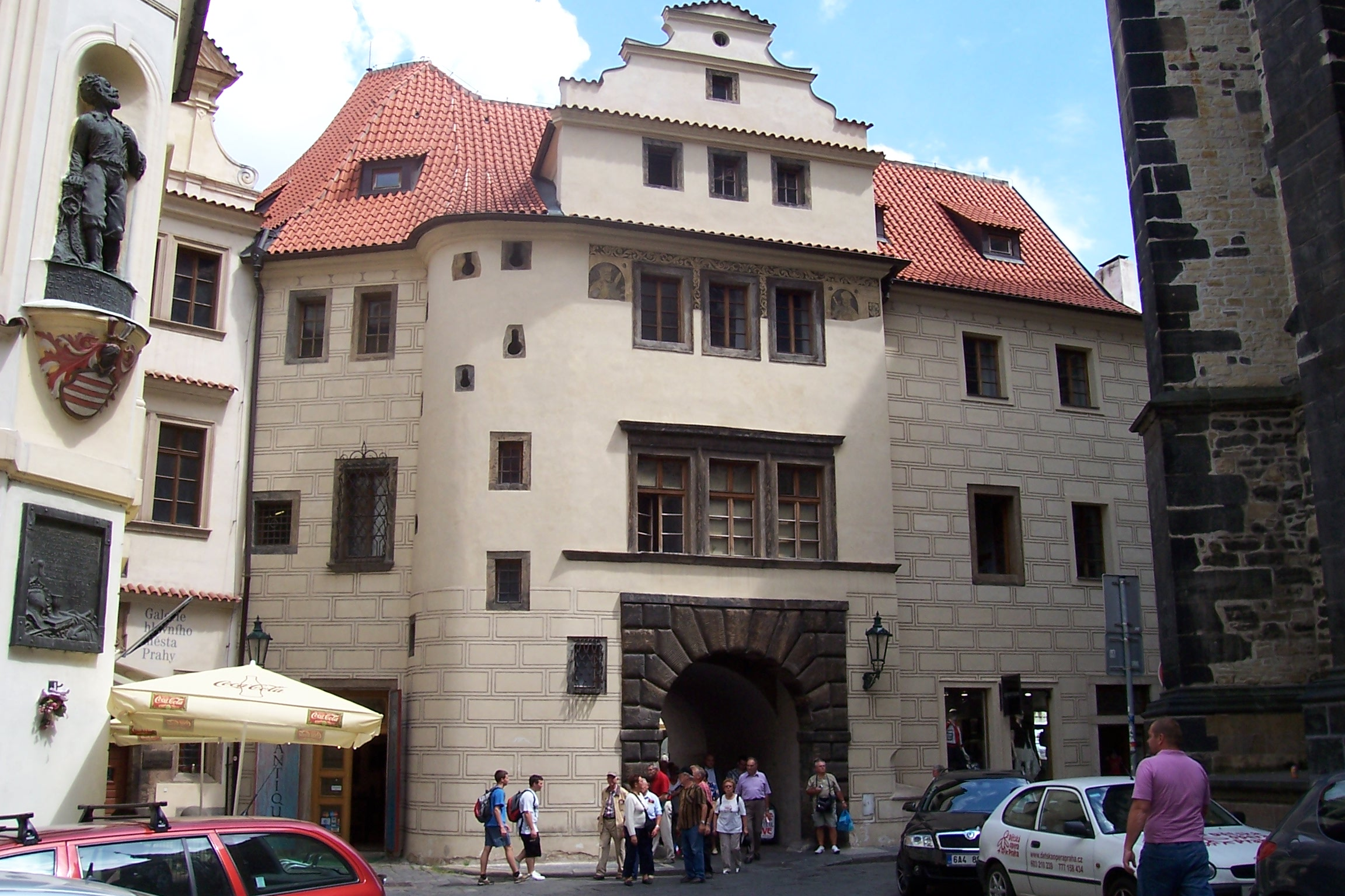 Celnice Ungelt (Staré Město), Praha 1, Týnská, Malá Štupartská, Týn 630/8, Staré Město